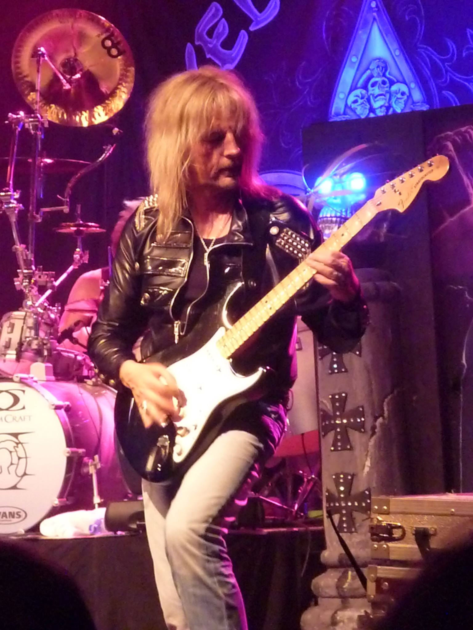 Axel Rudi Pell live in der Garage Saarbrücken